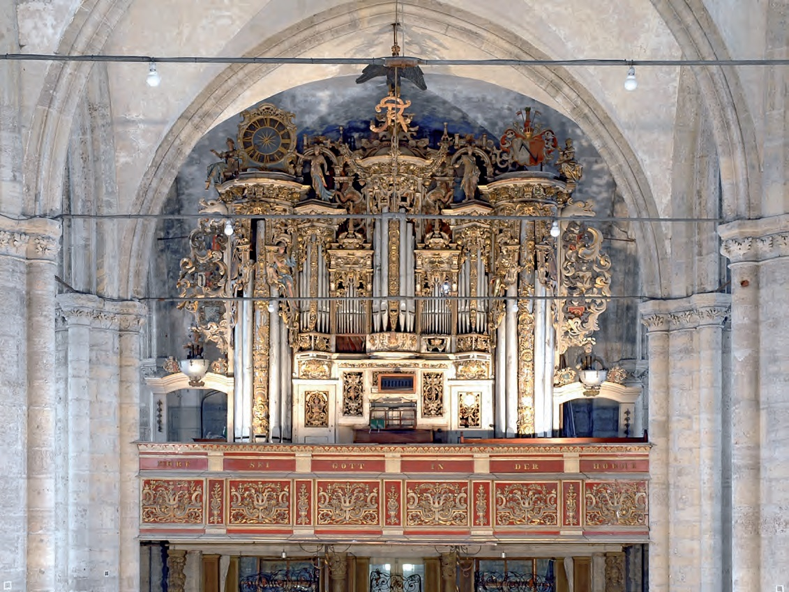 Gröninger Orgel der Martinikirche in Halberstadt, Sachsen-Anhalt, Deutschland